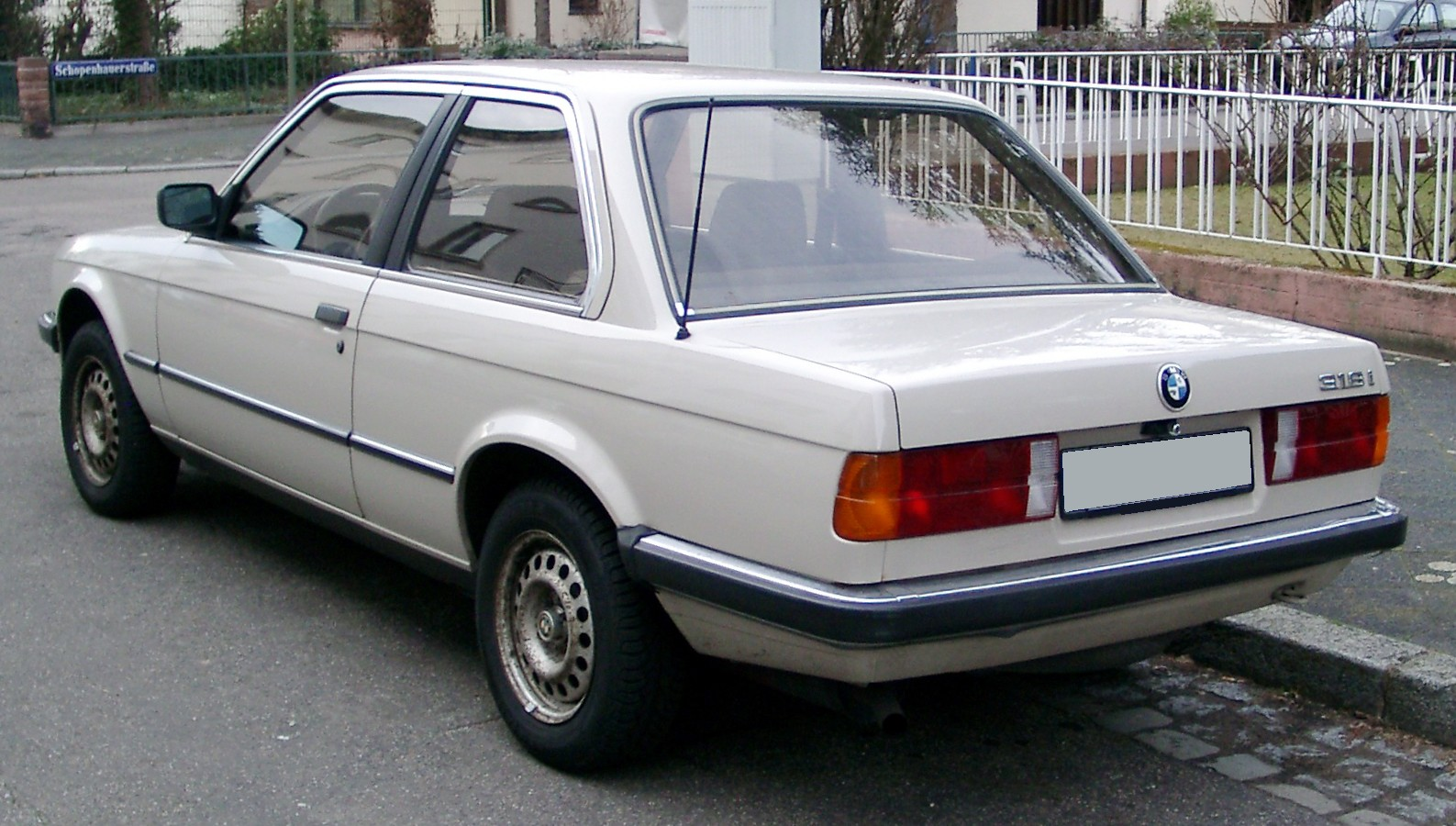 BMW E30